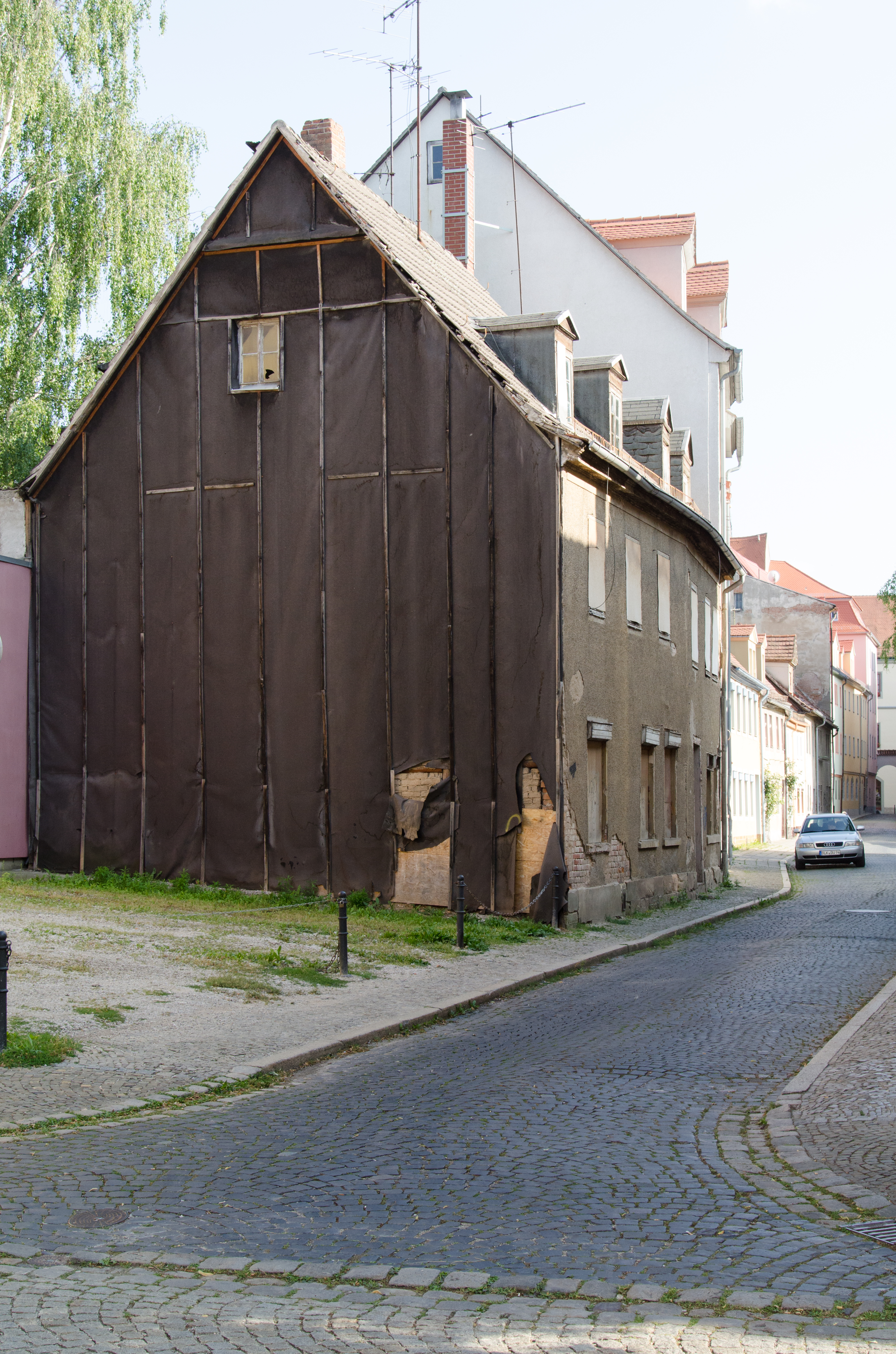 Naumburg, Mühlgasse 9